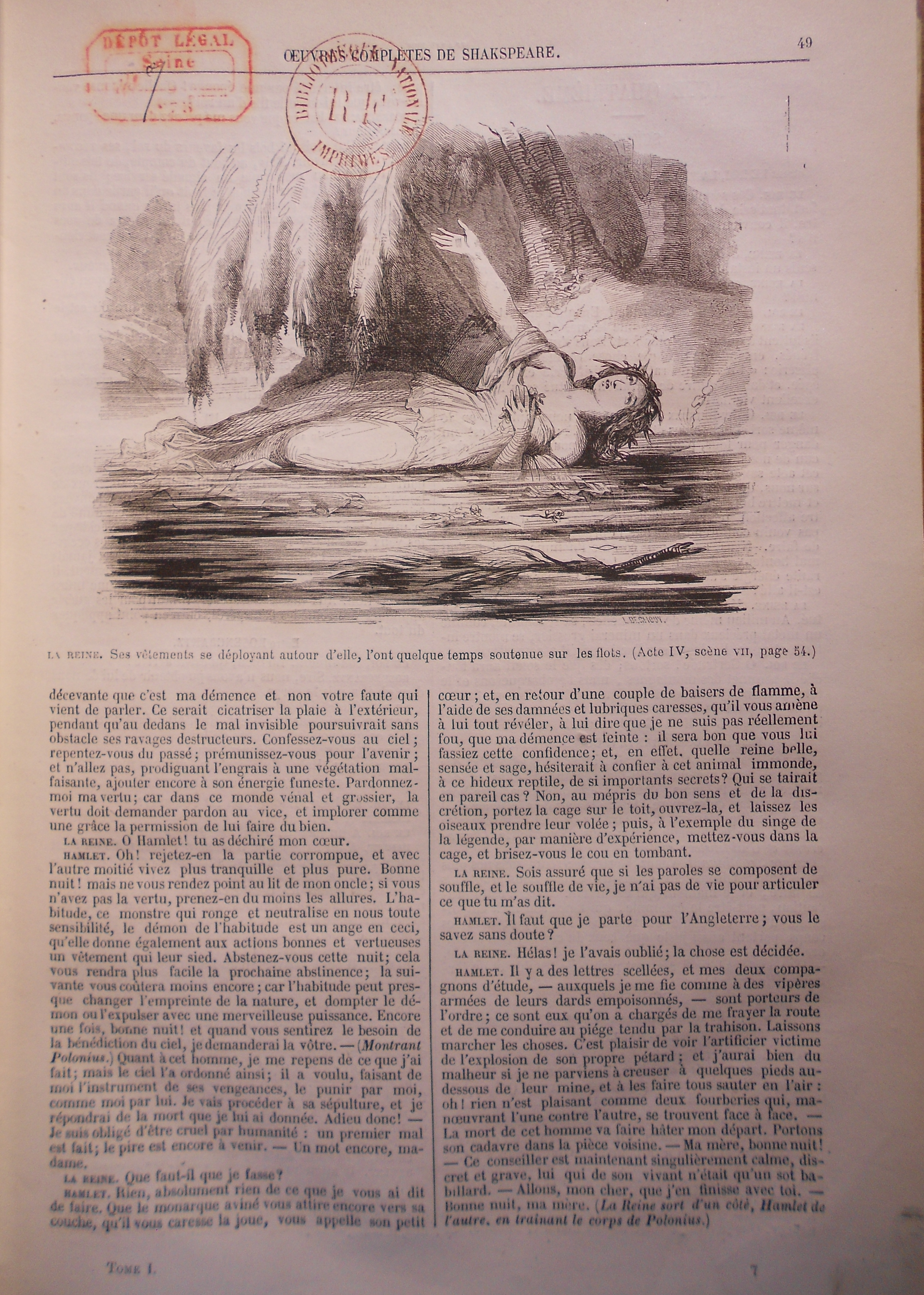 Oeuvre gravée par L. Deghouy d'après un dessin original de Félix Joseph Barrias, pour une oeuvre complète de Shakespeare parue en 1856.